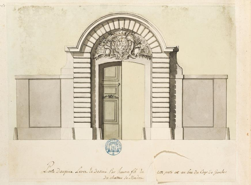 La porte Dauphine, réalisée en 1703 à l'entrée du domaine.